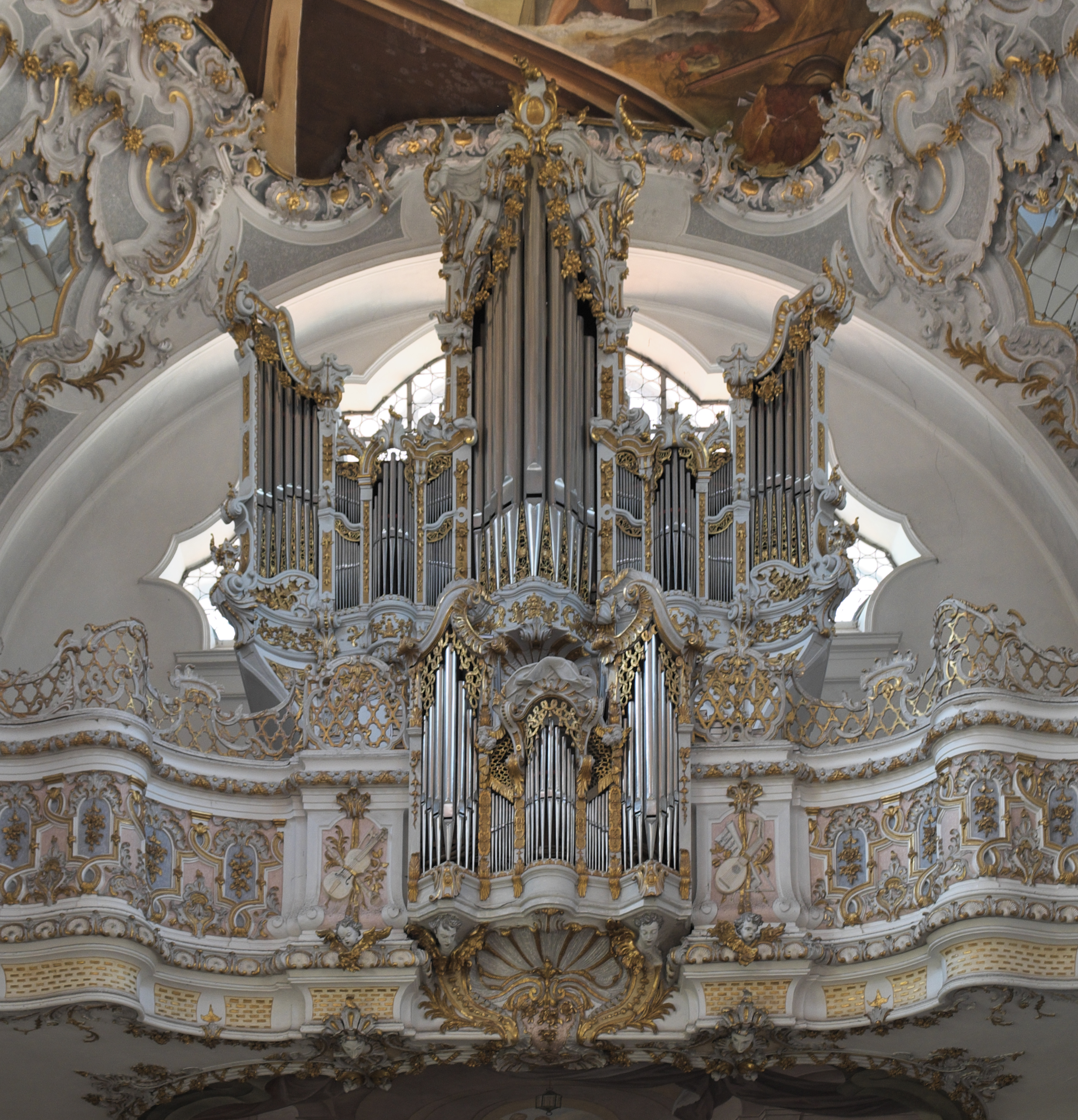 Steingaden, Ehemalige Stifts- und jetzige Pfarrkirche St. Johannes Baptist, Orgel